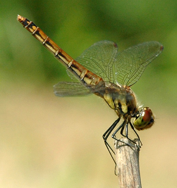 Sympetrum (赤とんぼ)